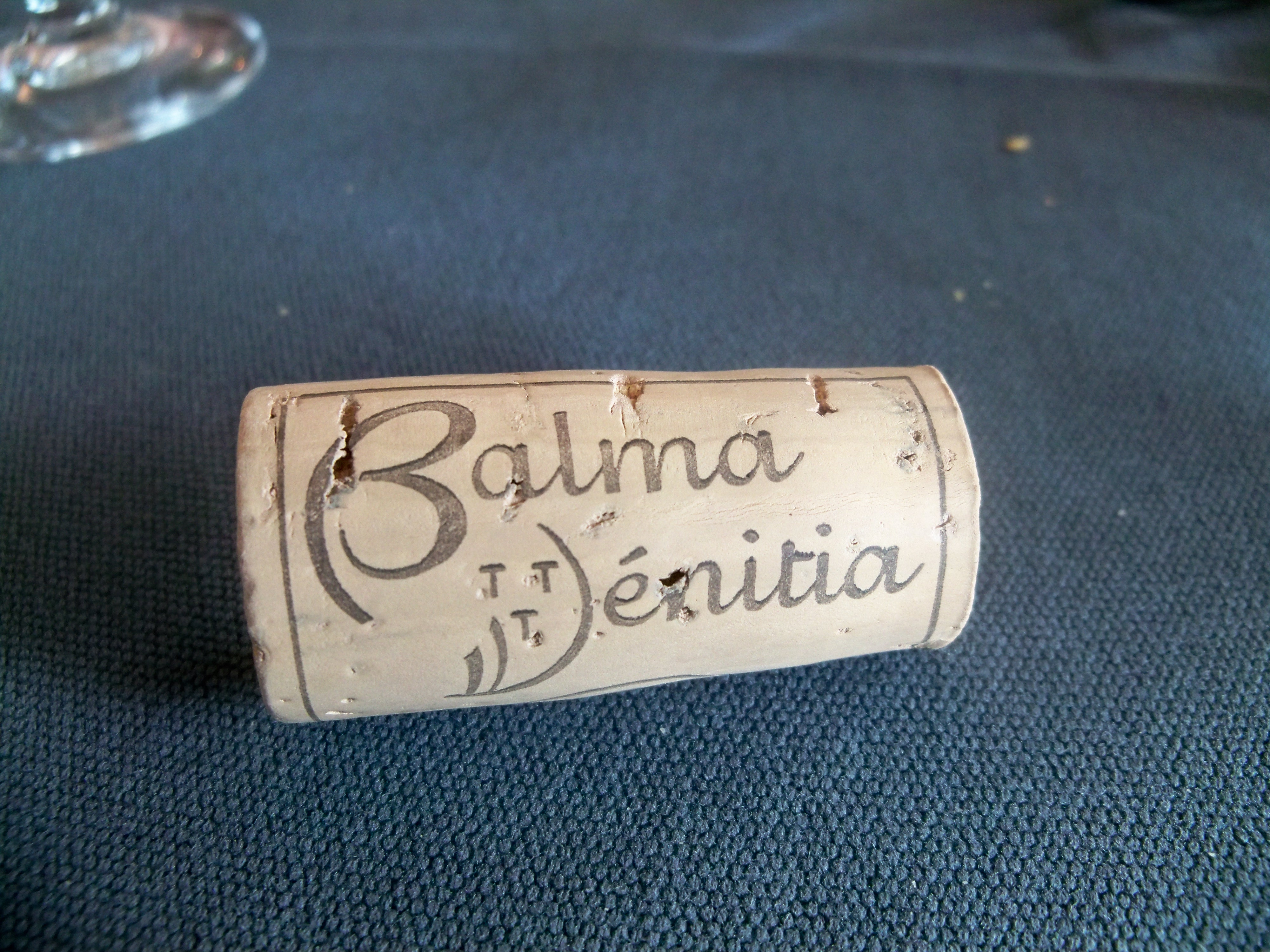 Bouchon de Balma Vénitia, Beaumes de Venise, Vaucluse